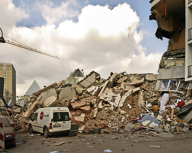 Dies ist eines der ersten Bilder nach dem Einsturz des Kölner Stadtarchivs. Der Fotograf erlebte den Einsturz mit und machte dies Bild unmittelbar nach dem Einsturz. Es wurde von der südlichen Seite aus aufgenommen und zeigt die Trümmer des Stadtarchivs die auf der Severinstraße liegen. Im Hintergrund sieht man das Hochhaus des ehemaligen Polizeipräsidiums am Waidmarkt und die Spitze der Kirche St. Georg.